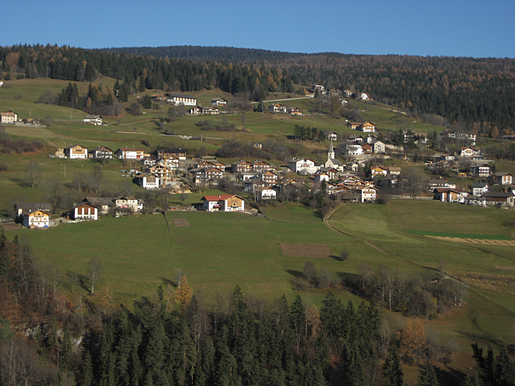 St. Felix am Nonsberg in Südtirol